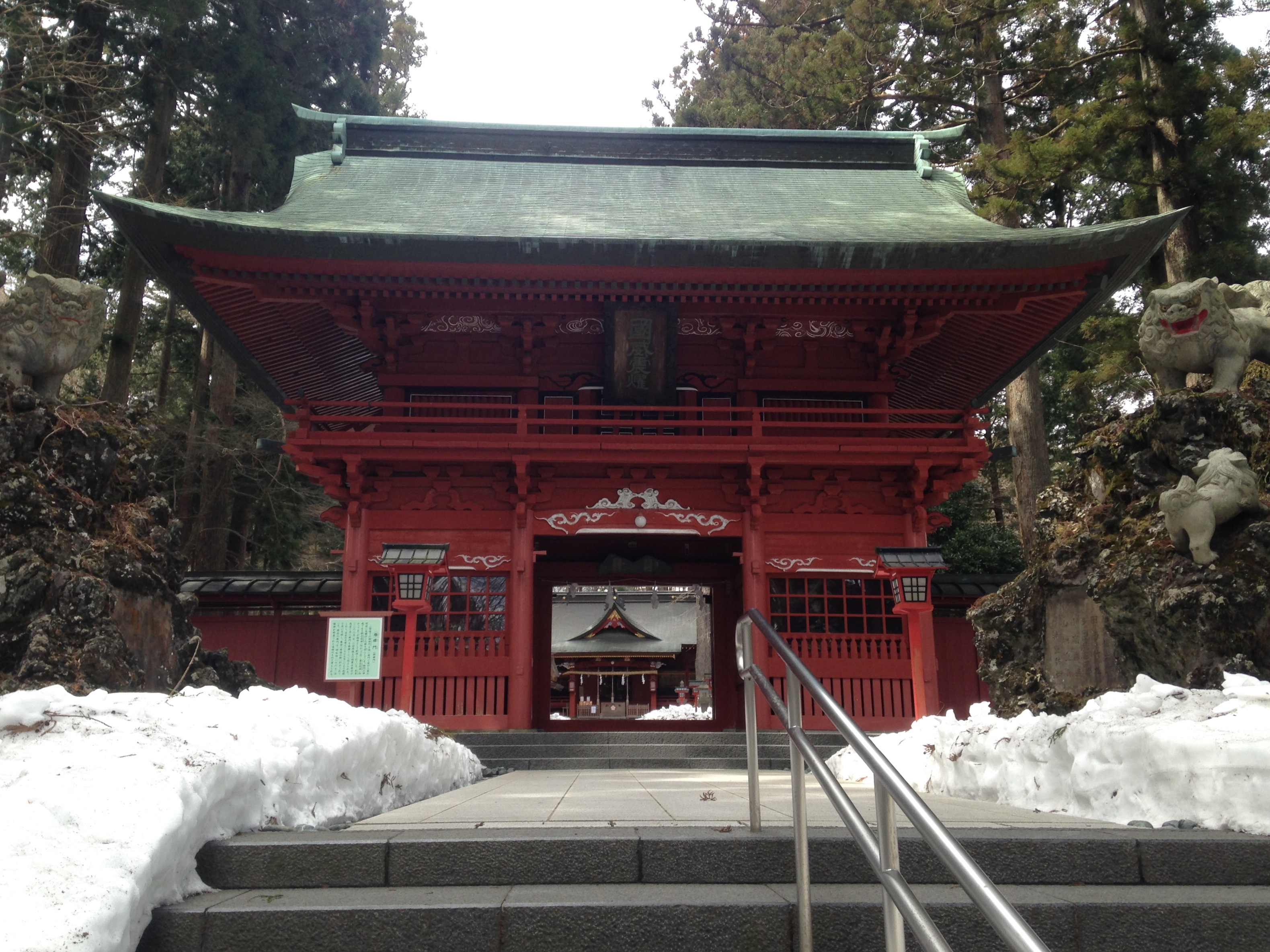 須走浅間神社・楼門